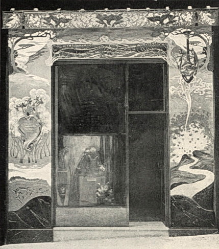 Joieria Masriera ubicada a C/ Ferran 51 (Barcelona, Catalunya). Disseny de Victor Masriera de 1903. Va guanyar el premi anual de l'Ajuntament de Barcelona.